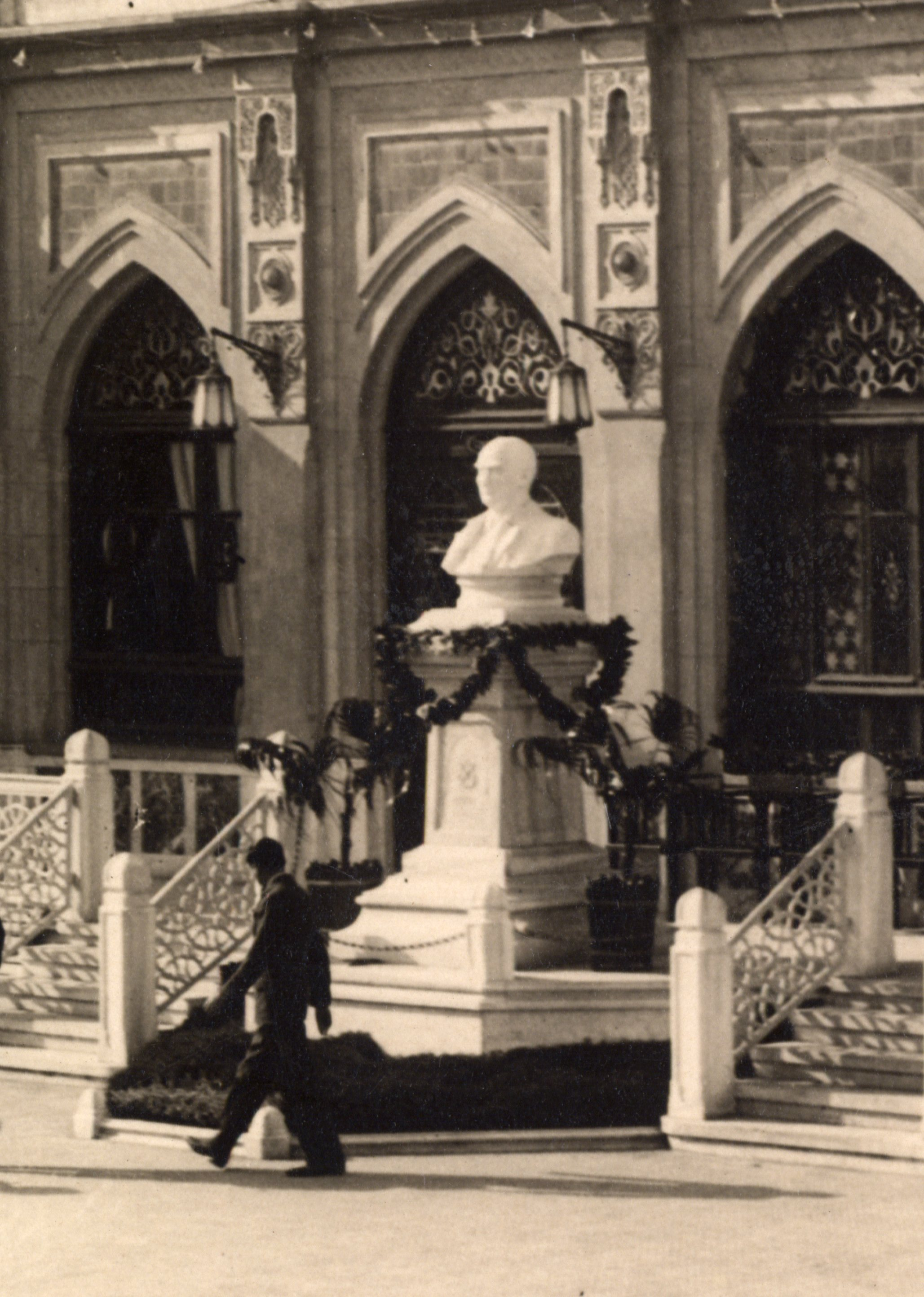 Atatürk’ün sağlığındaki ilk büstü, dönemin Seyr-i Sefain (Deniz Yolları) İdaresi Genel Müdürü Sadullah Güney’in teklifiyle 1926’da heykeltıraş Kenan Ali Yontunç’a yaptırılarak yolcu salonunun önüne yerleştirildi. Güney, idaredeki görevinin yanı sıra 1929’da, Atatürk’ün talimatıyla Yalova Termal Kaplıcaları’nın modern bir tesis olarak hizmete açılması görevini üstlendi. Tophane’de bulunan Seyr-i Sefain İdaresi’nin 1933’te lağvedilmesinin ardından buradan taşınan büst, 1967’de Denizcilik Bankası Denizyolları İşletmesi tarafından kaplıcalara hediye edildi. Öte yandan; bir dönem Yontunç’la çalışmış olan Alman heykeltıraş Her Gros 1931’de, Türkiye’nin çeşitli bölgelerinde Yontunç imzasıyla sergilenen kimi eserlerin kendisine ait olduğunu iddia etti. 23 Temmuz 1931 tarihli “Son Posta” gazetesinde, heykeltıraş Sabiha Ziya’nın, bu iddiaların gerçek olduğunu belirten bir yazısı yayımlandı. Gros’un şahit gösterdiği Esnaf Bankası Müdürü Faik Bey ise, ilerleyen günlerde “Vakit” gazetesine verdiği demeçte Alman heykeltıraşı tanımadığını ifade ederek söz konusu haberleri yalanladı. SALT Araştırma, Fotoğraf Arşivi SALT Research, Photography Archive